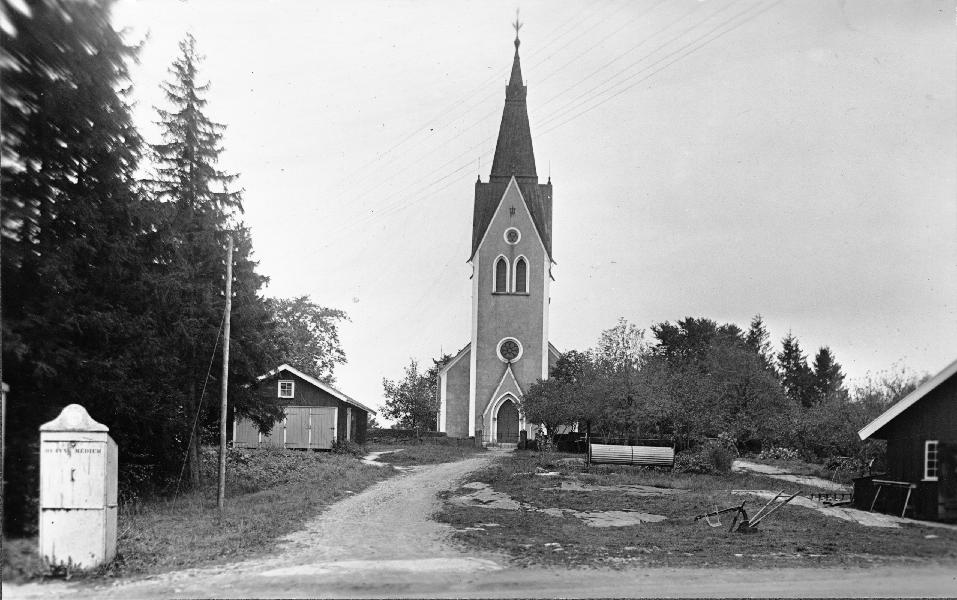 Kyrkan och dess omgivning från norr.